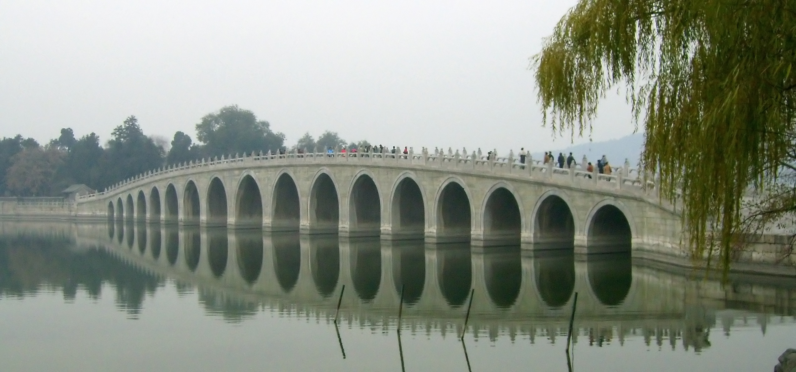 颐和园十七孔桥